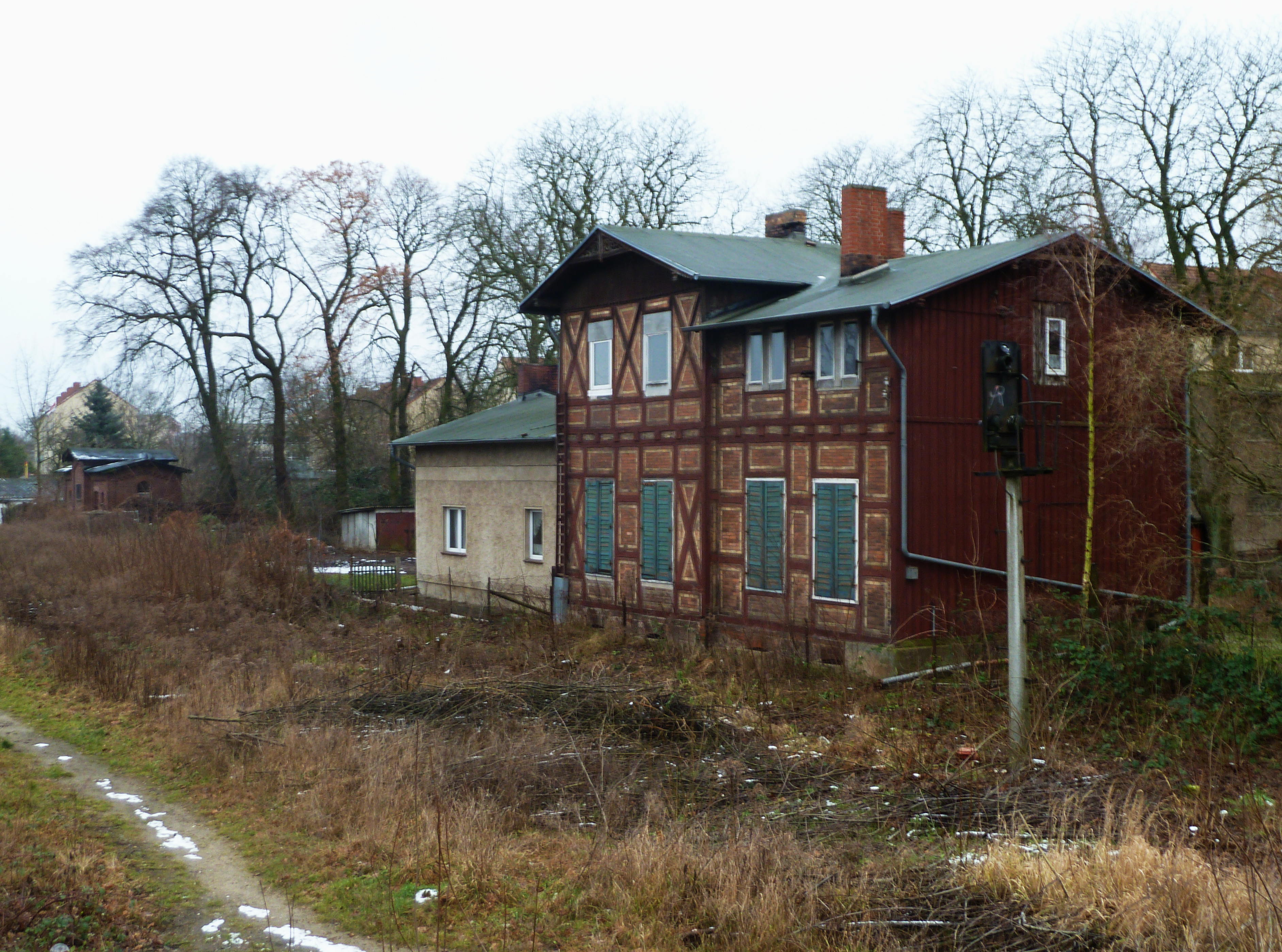 Neuruppin, Alter Paulinenenauer Bahnhof von 1880, Baudenkmal, frühere Gleisseite, im Hintergrund das Toilettenhäuschen